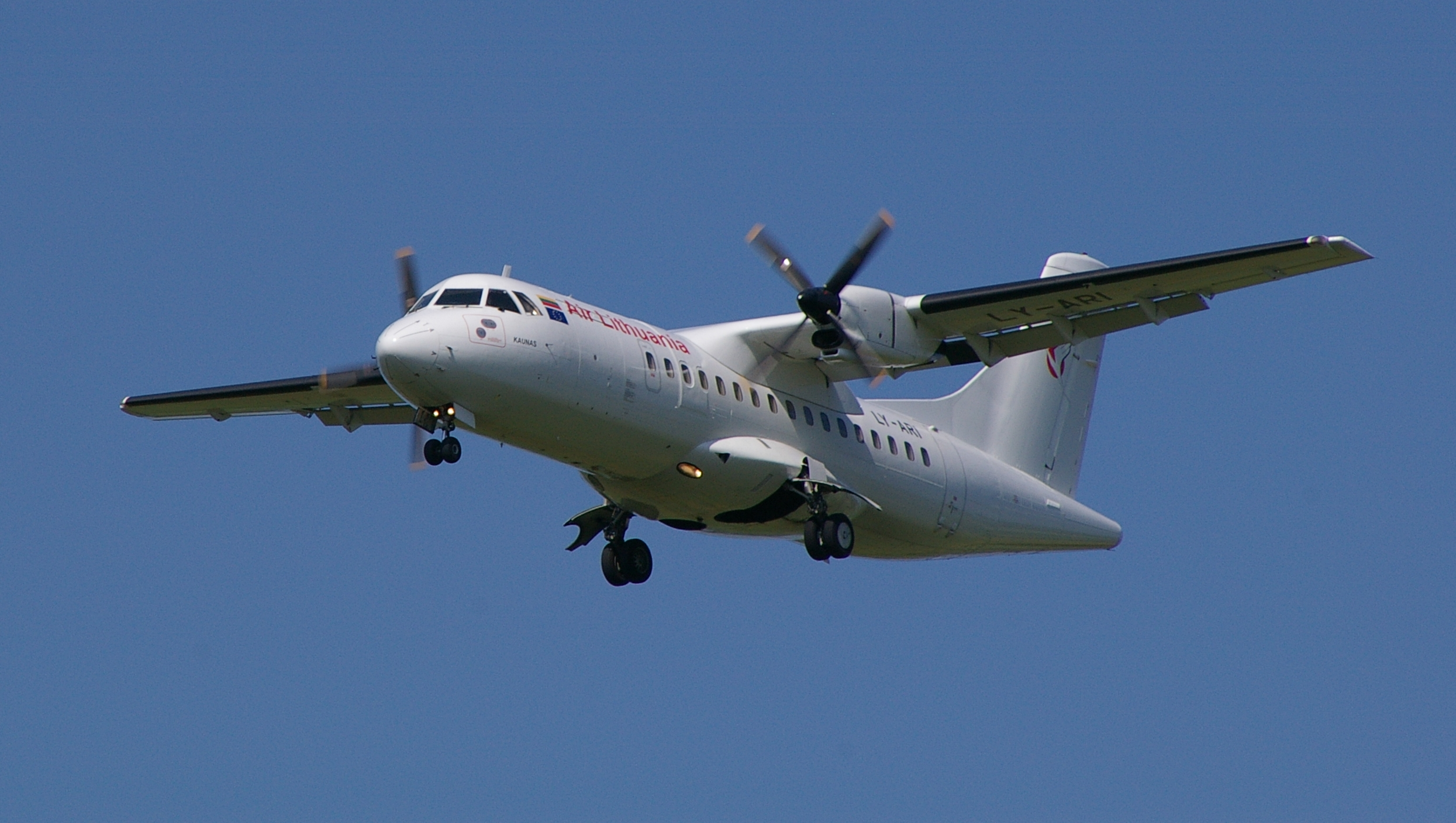 ATR 42 (LY-ARI) der Fluglinie Air Lithunia im Juni 2005.